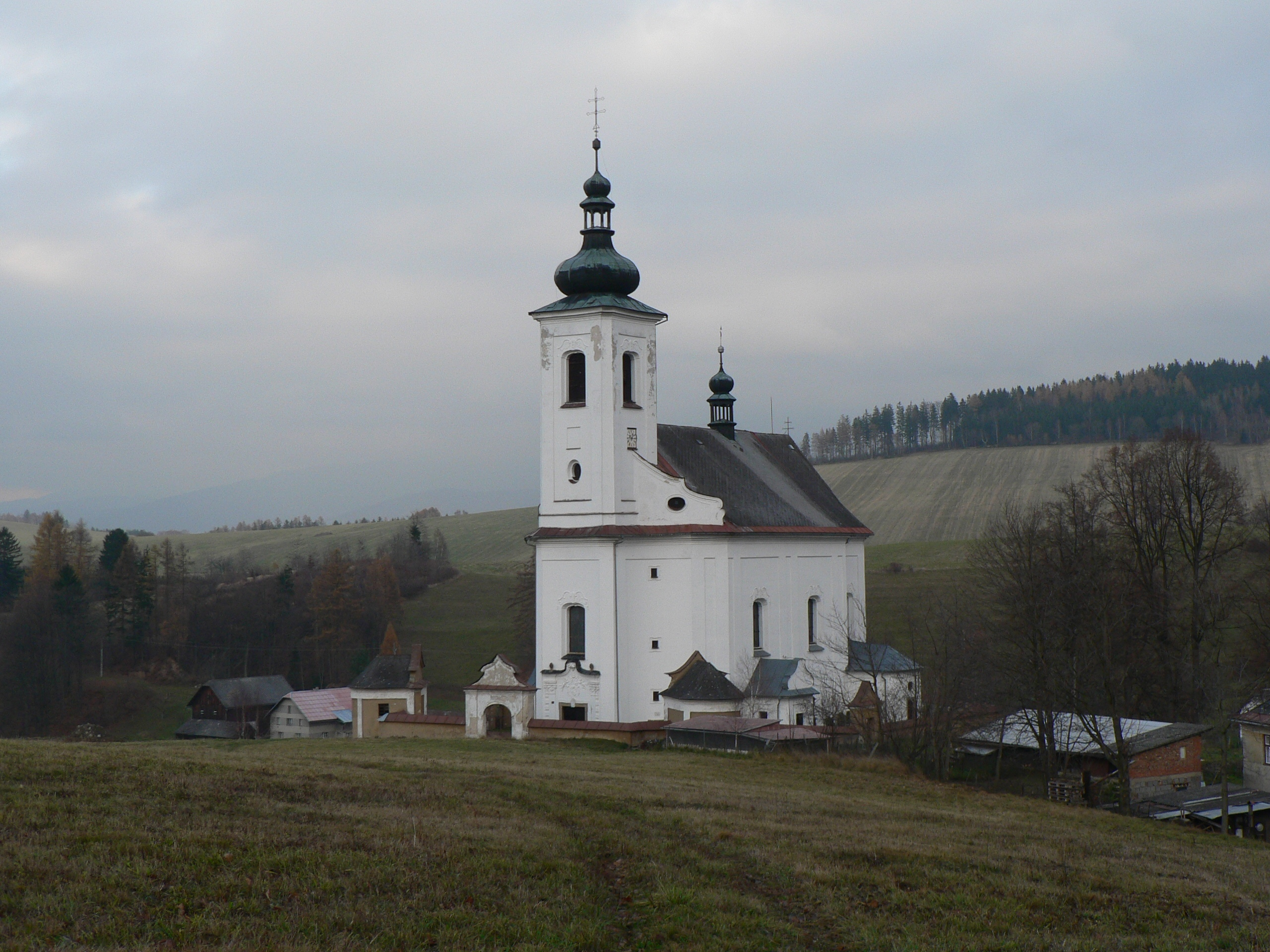 Kostel Nejsvětější Trojice (Kopřivná)